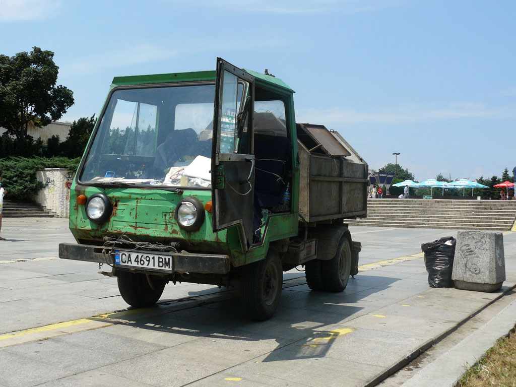 Vozítko Multicar M25.